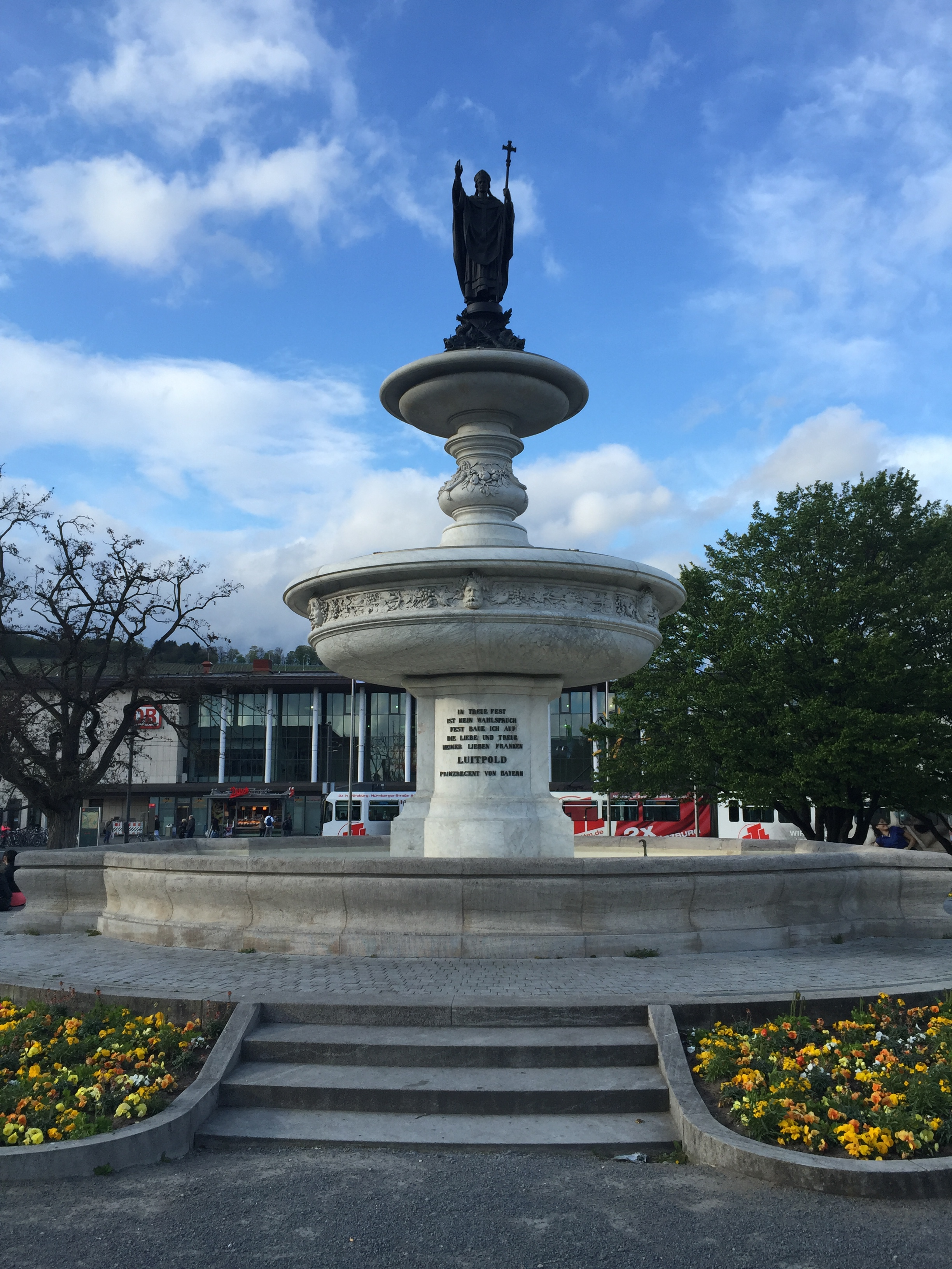 Statue Prinzregent Luitpold, Würzburg